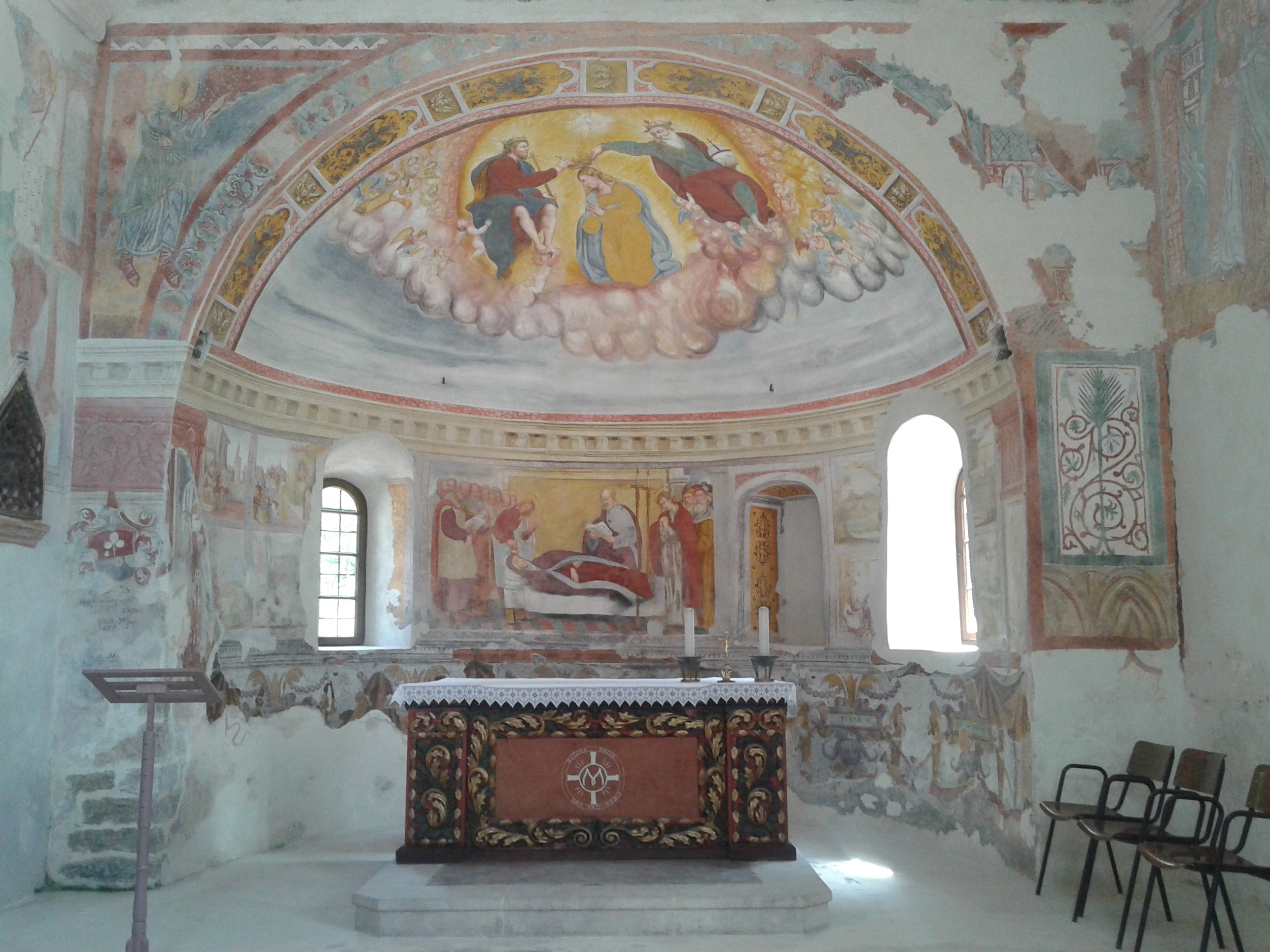 Il presbiterio della chiesa duecentesca di san Vittore, che sovrasta il paese di Tonadico, in Trentino